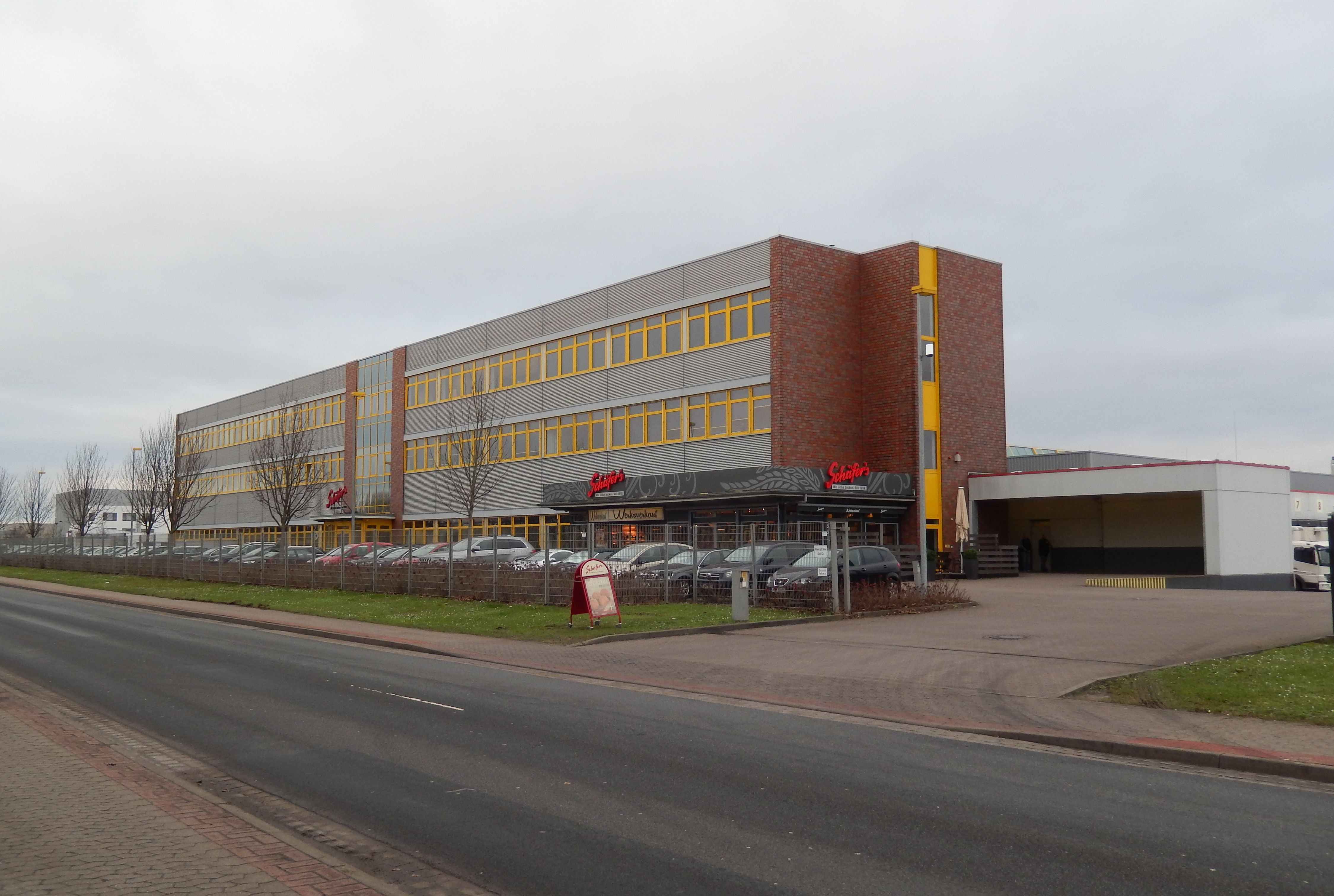 Schäfer's in Lehrte, Mielestraße